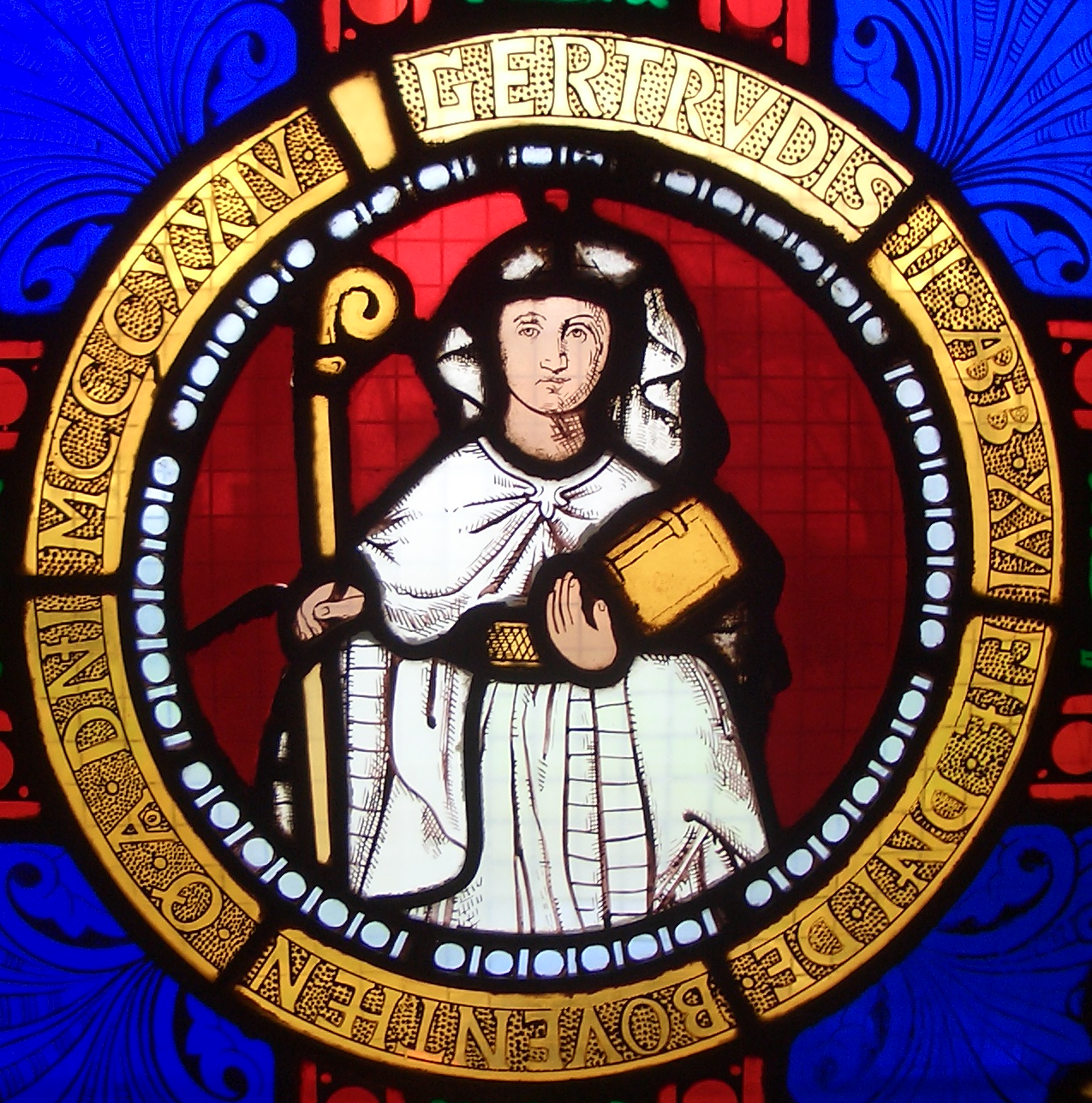 Äbtissin Gertrud II. vom Stift Gernrode